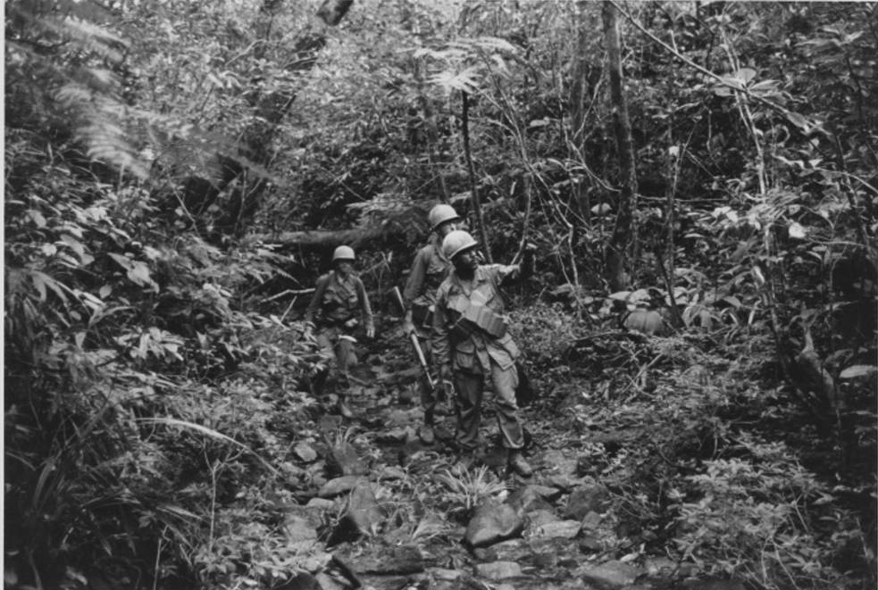 Three soldiers on patrol in dense Vietnam jungle.